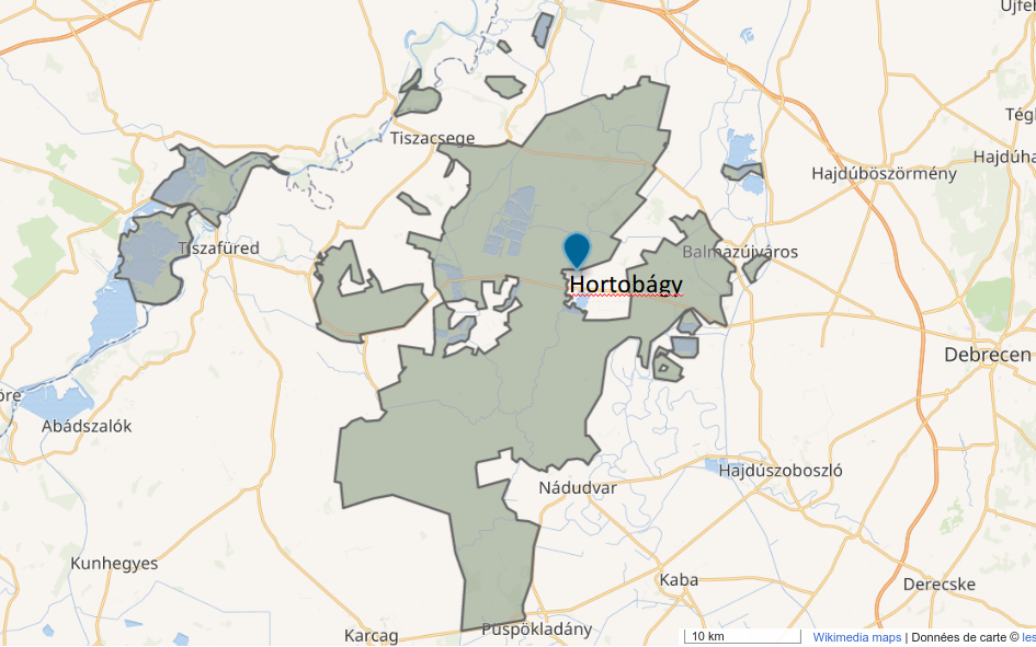 capture d'écran de openstreetmap du parc national de Hortobágy